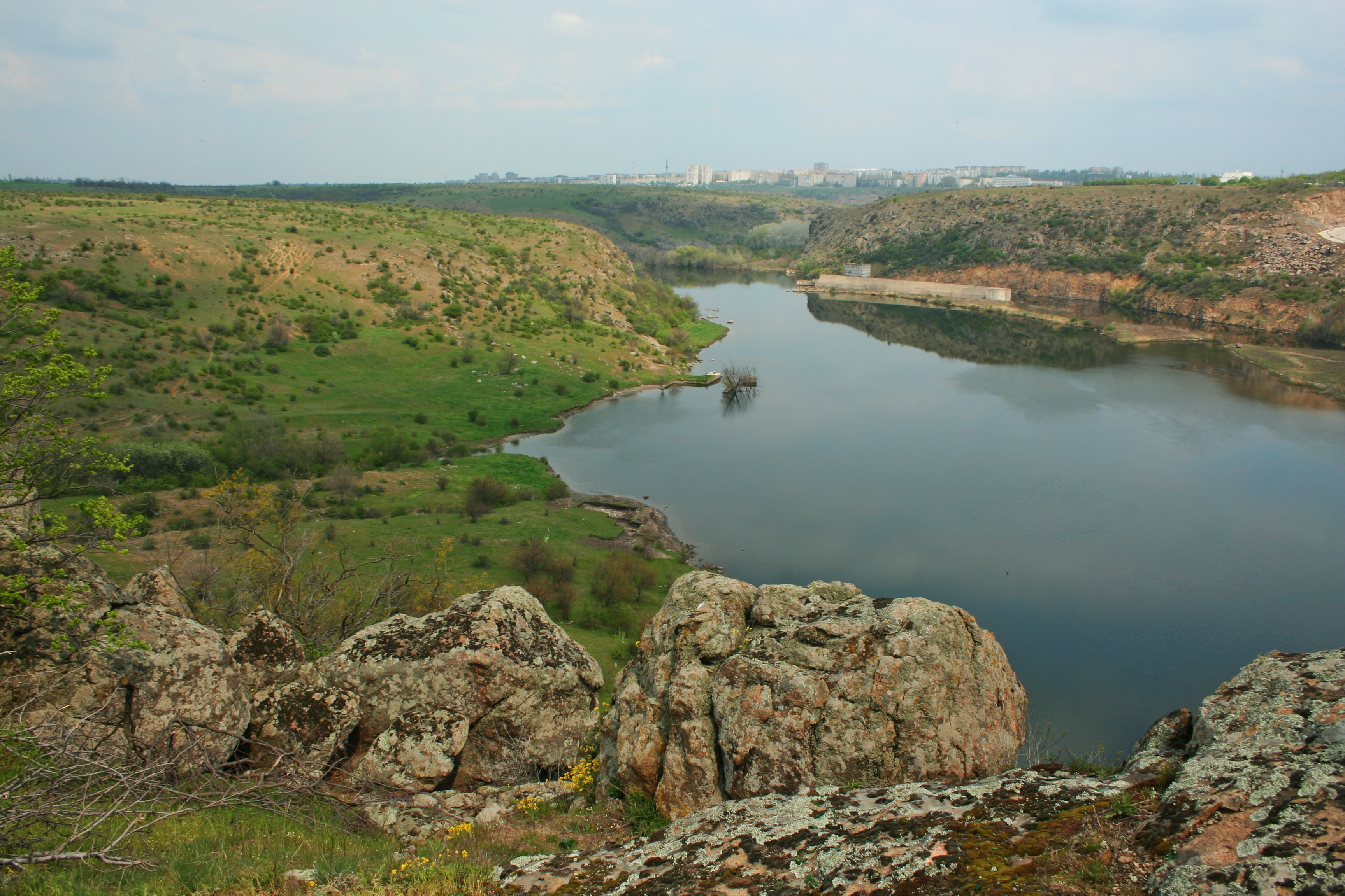 Історичний ландшафт центру Буго-Гардівської паланки Війська Запорозького, місто :uk:Южноукраїнськ,смт Костянтинівка Арбузинського району,село Богданівка Доманівського району